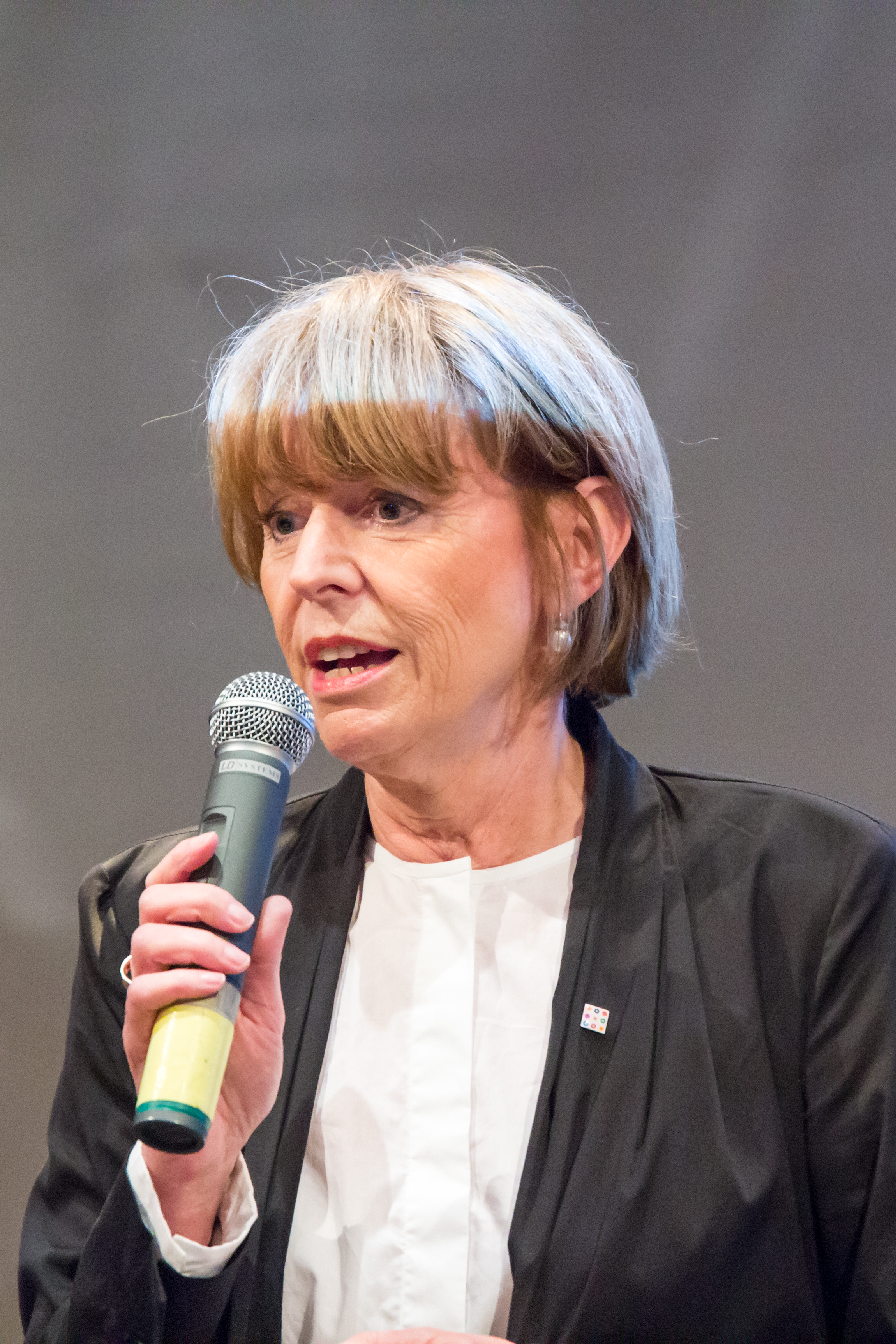 Henriette Reker bei einer Veranstaltung der Kölner Wohlfahrtsverbände am 09.06.2015